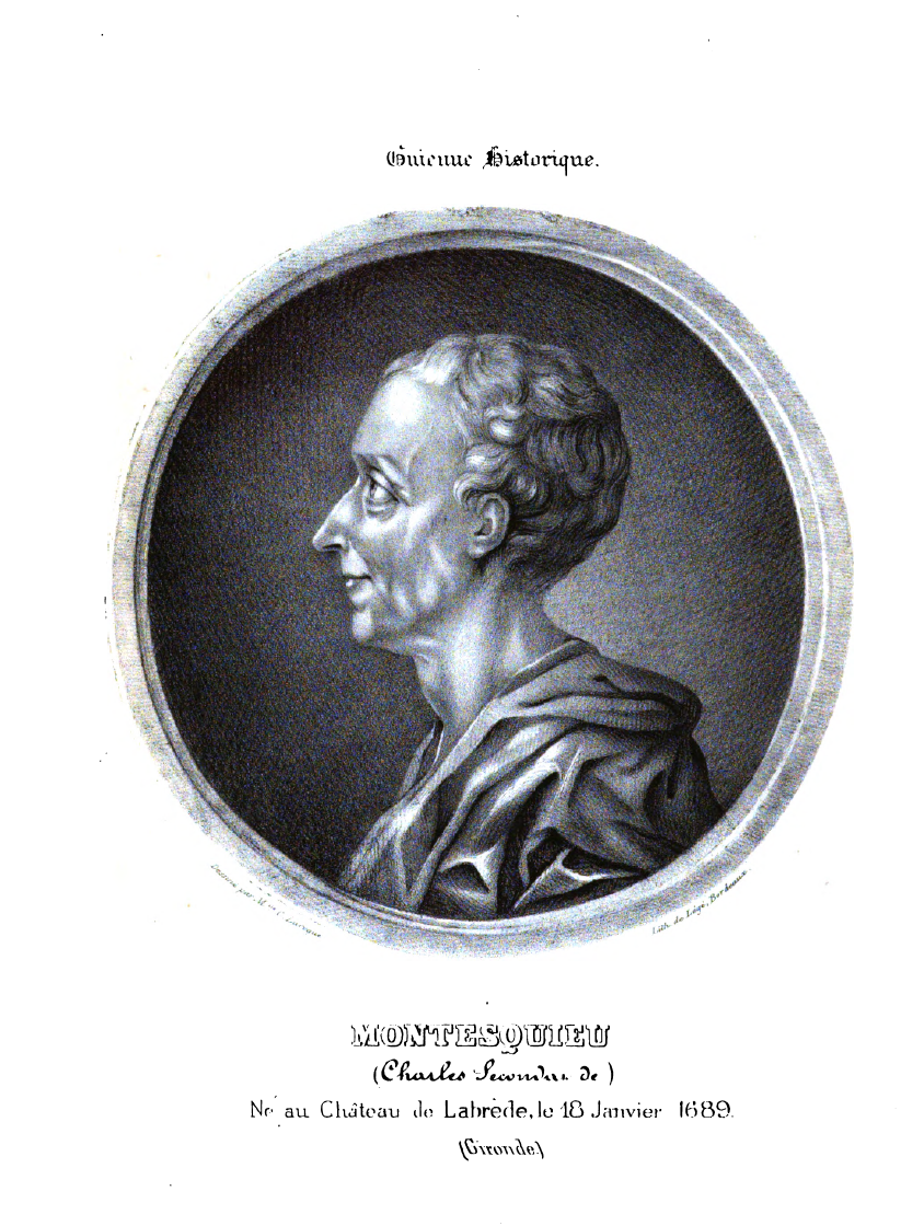 Montesquieu